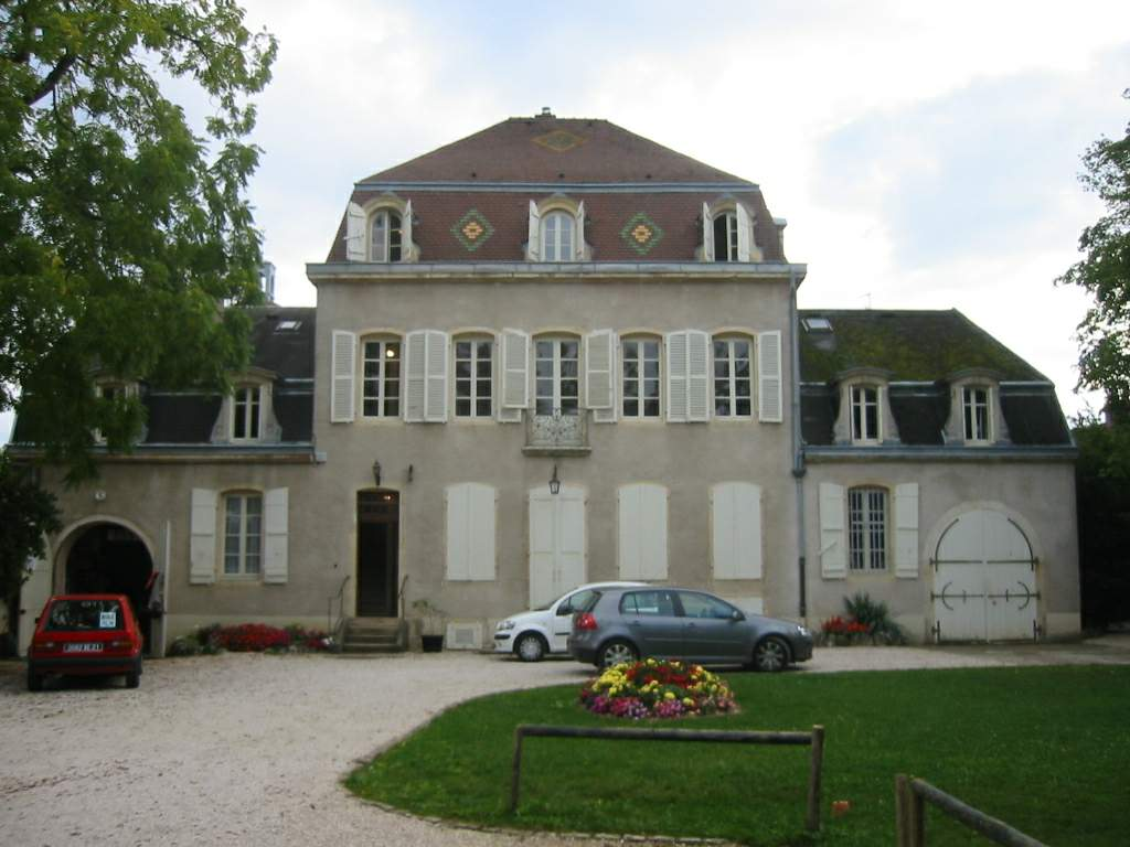 Maison des societés de Marsannay la Cote